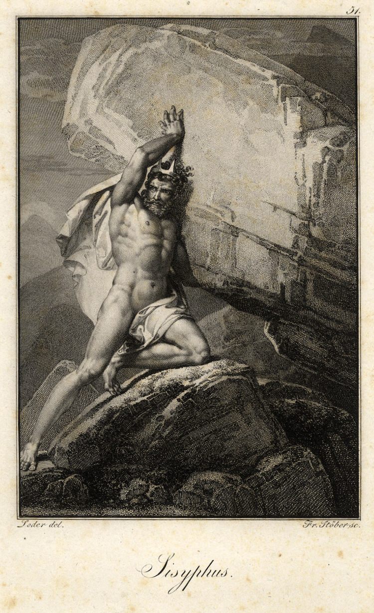 Matthäus Loder: Sisyphus, Kupferstich; 1. H. 19. Jh., gestochen von Friedrich John